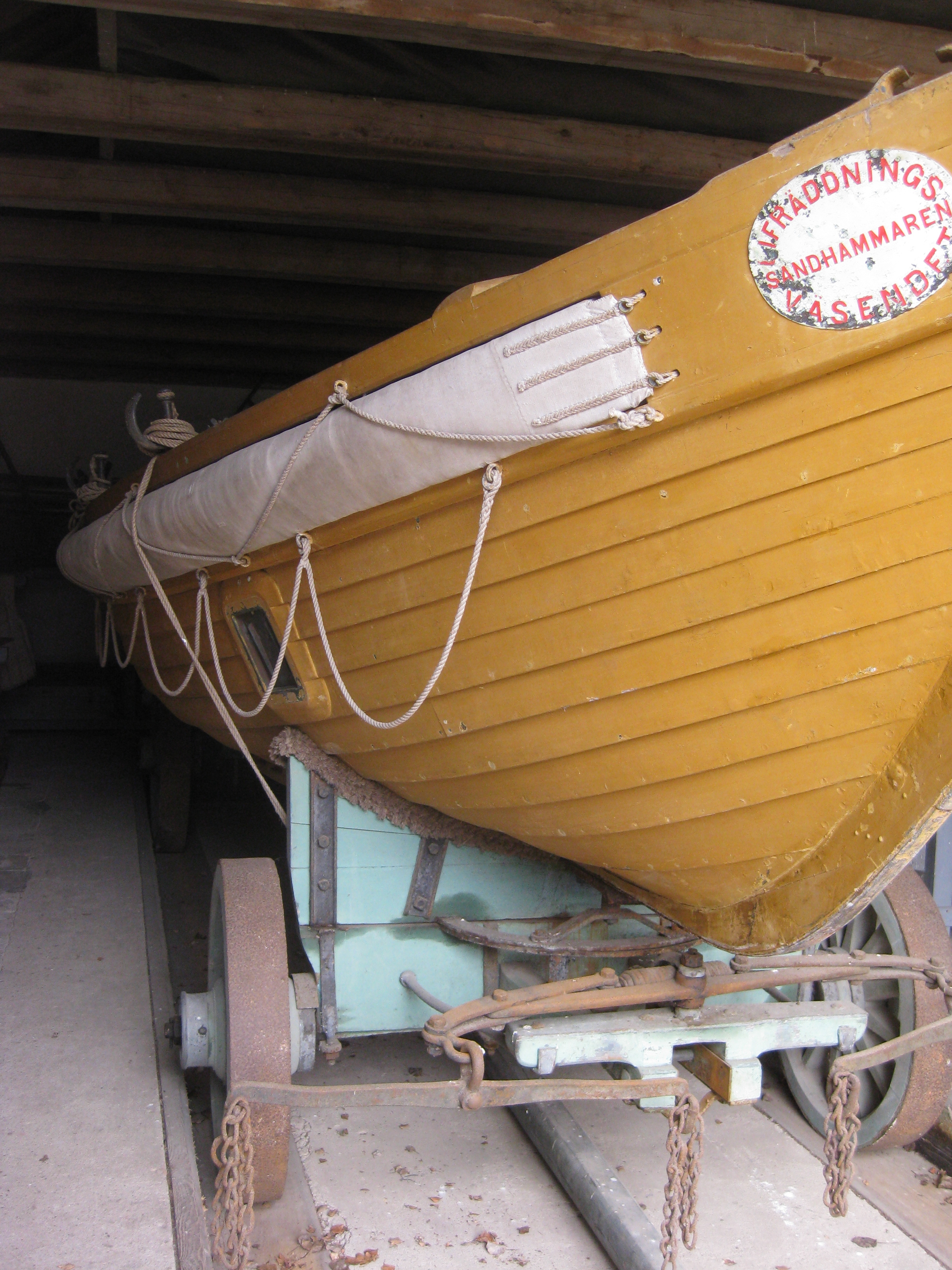 Livräddningsbåten i Sandhammarens livräddningsmuseum